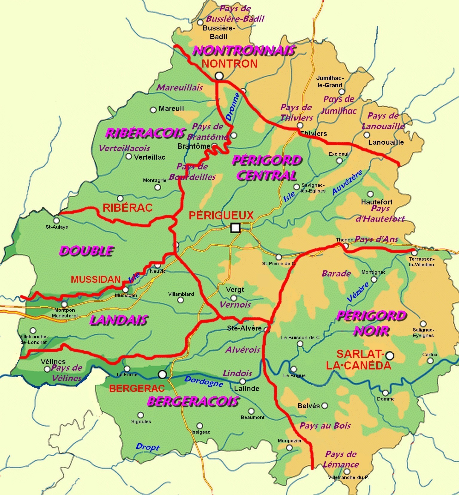 Pays traditionnels du Périgord (département de la Dordogne - France) d'après Frédéric Zégierman.